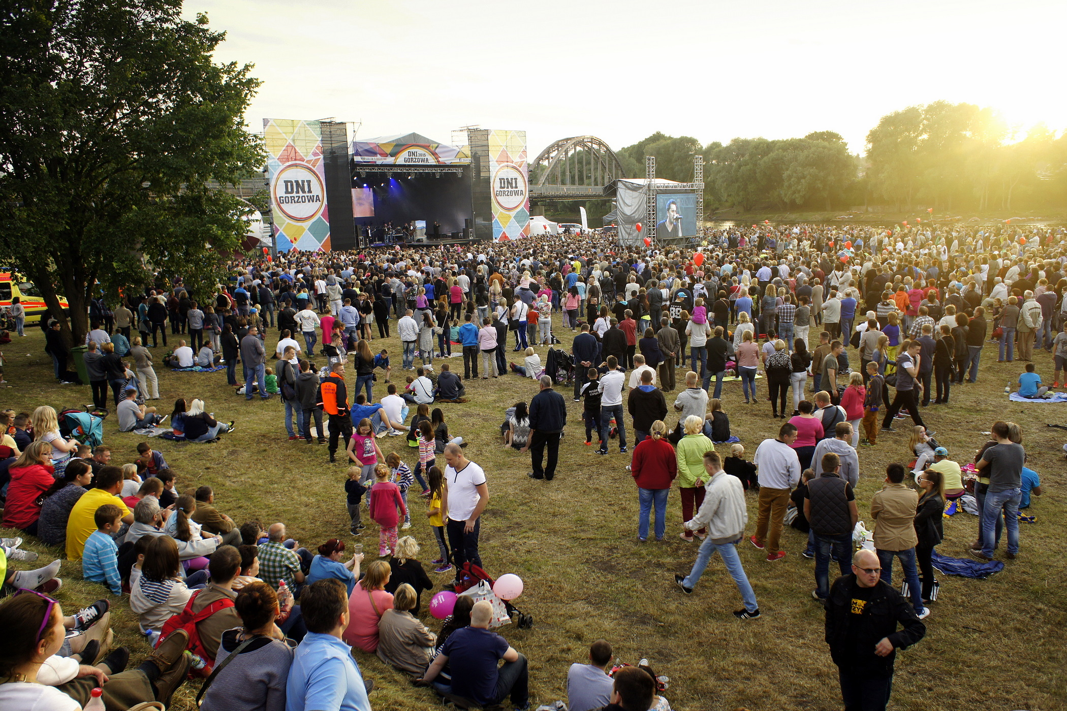 Gorzów Wlkp., błonia nadwarciańskie. " Dni Gorzowa 2015 "